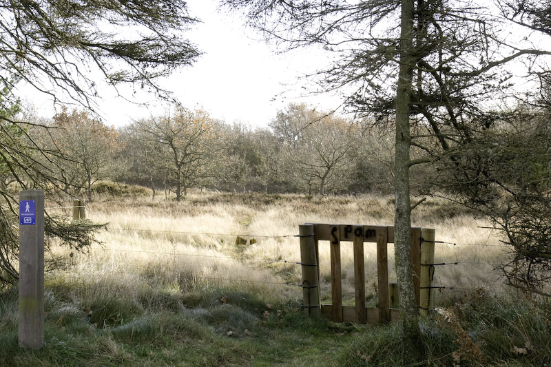 Kalmer Rimmer, close to Frederikshavn, Denmark